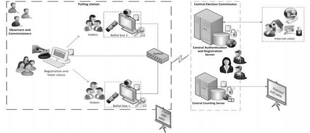 Algoritmi për pagesat në Internet